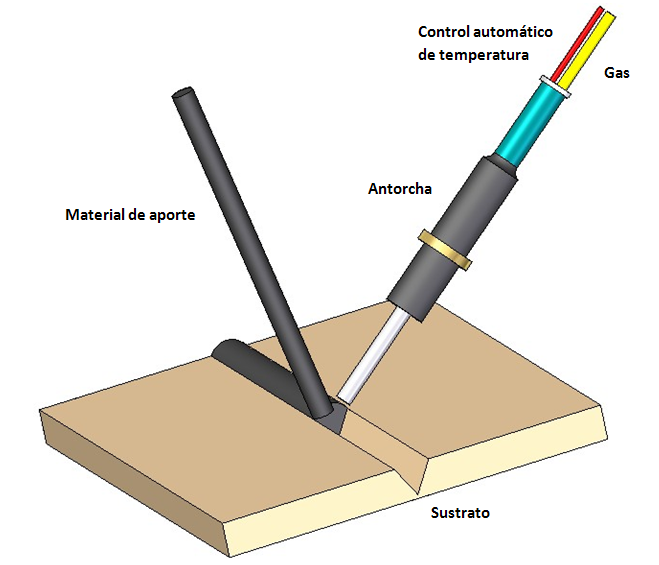 Esquema de soldadura de termoplásticos mediante gas caliente